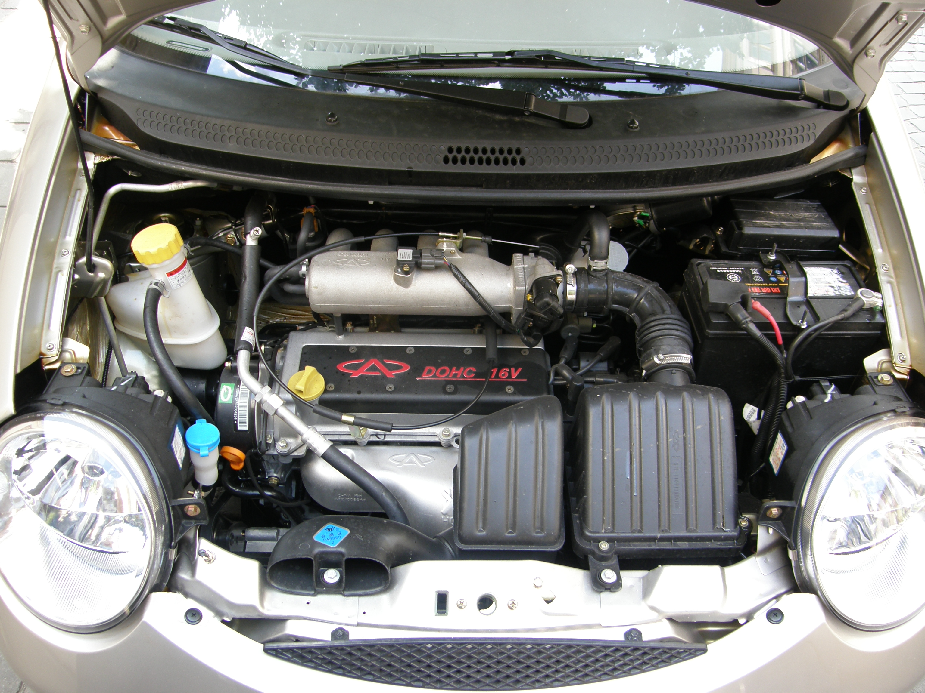 Категорія:Зображення:Автомобілі Chery Категорія:Зображення:by Oleh Kernytskyy